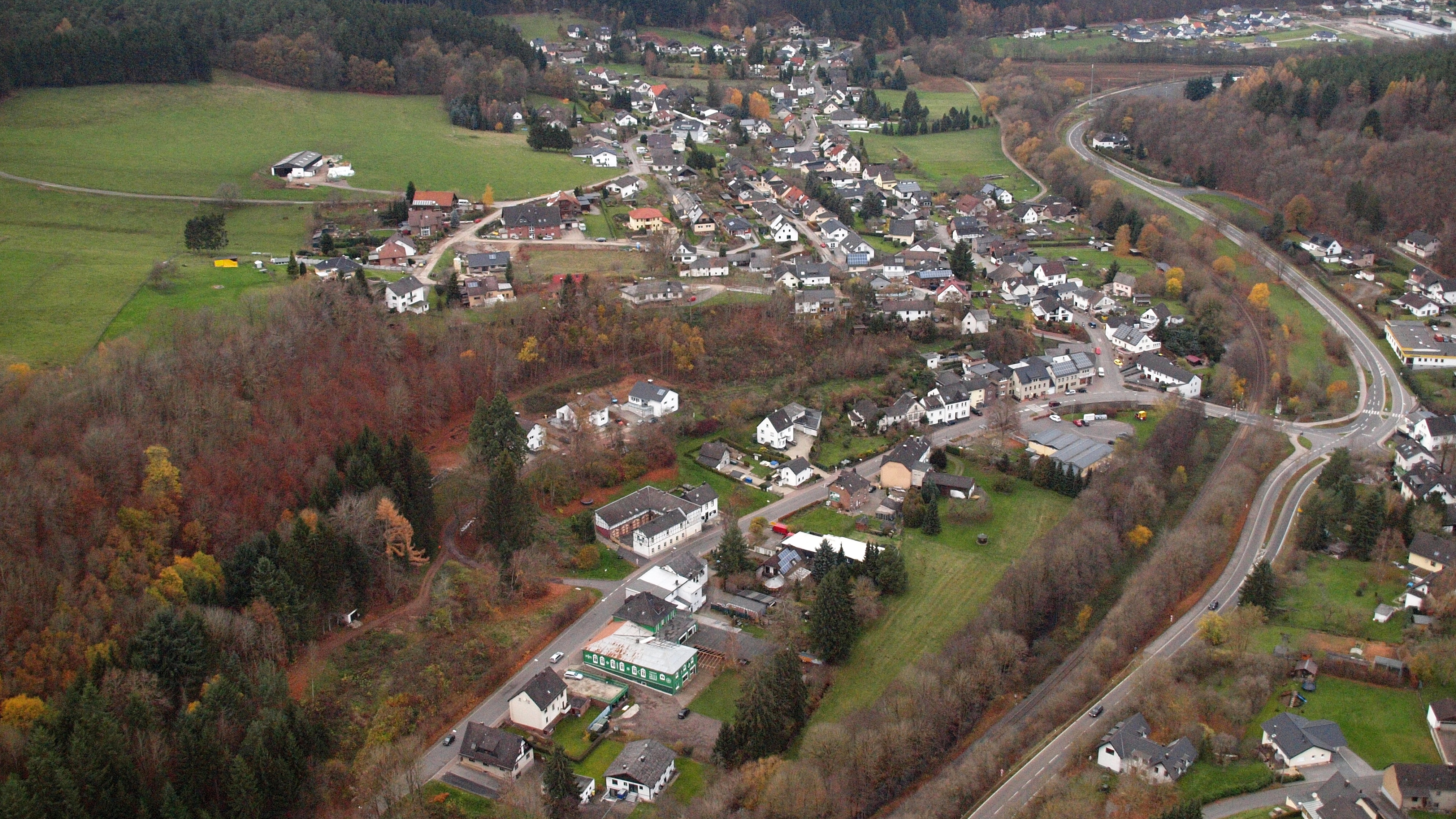 Sötenich, Luftaufnahme (2015)